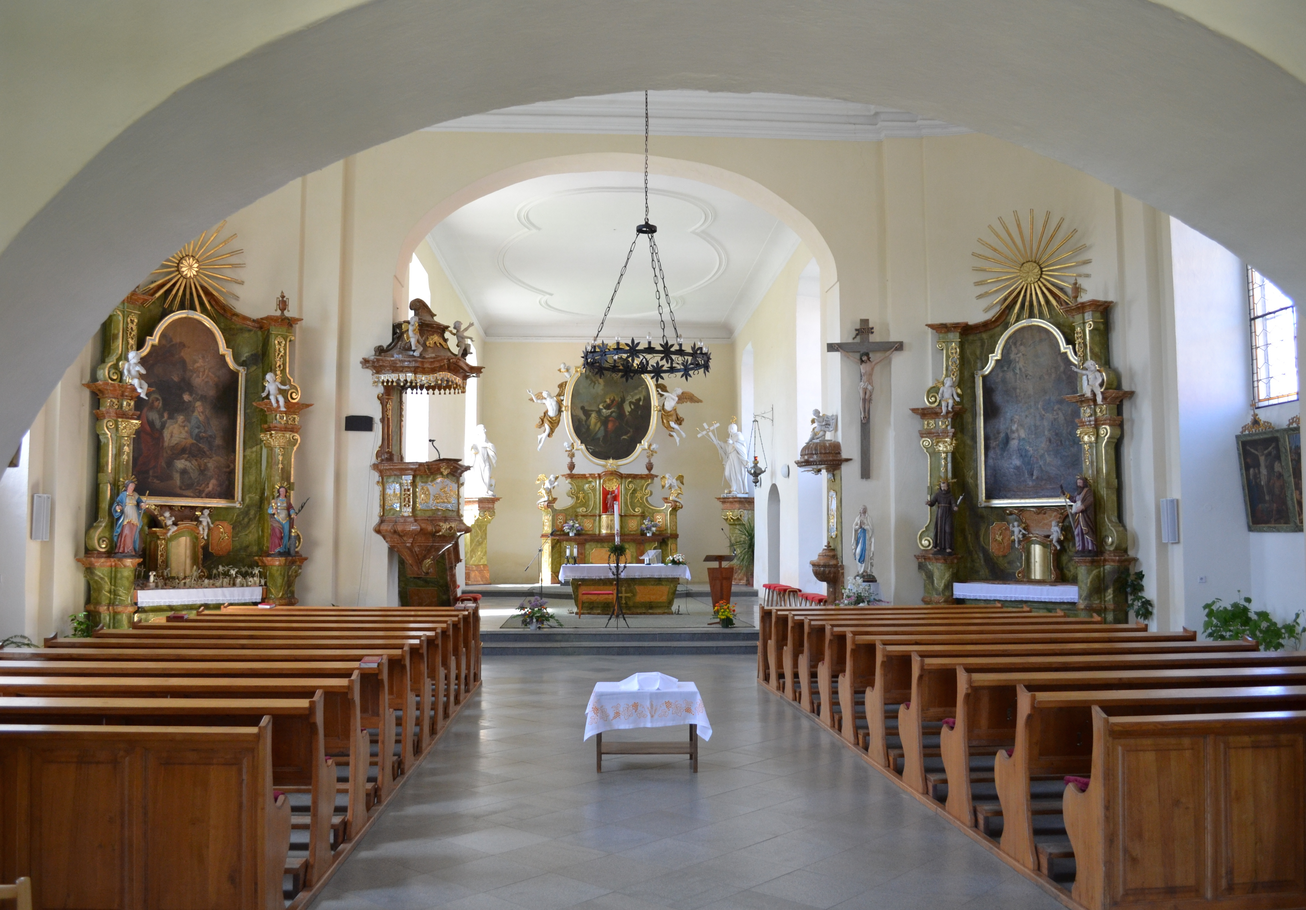 Horní Bobrová - kostel sv. Petra a Pavla, interiér